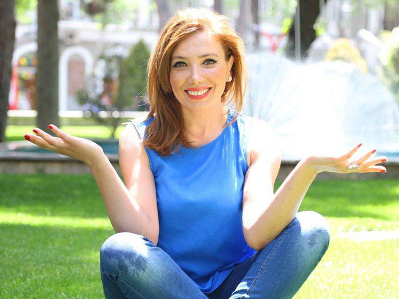 Letafet Elekberova - ince ve gozel xanim